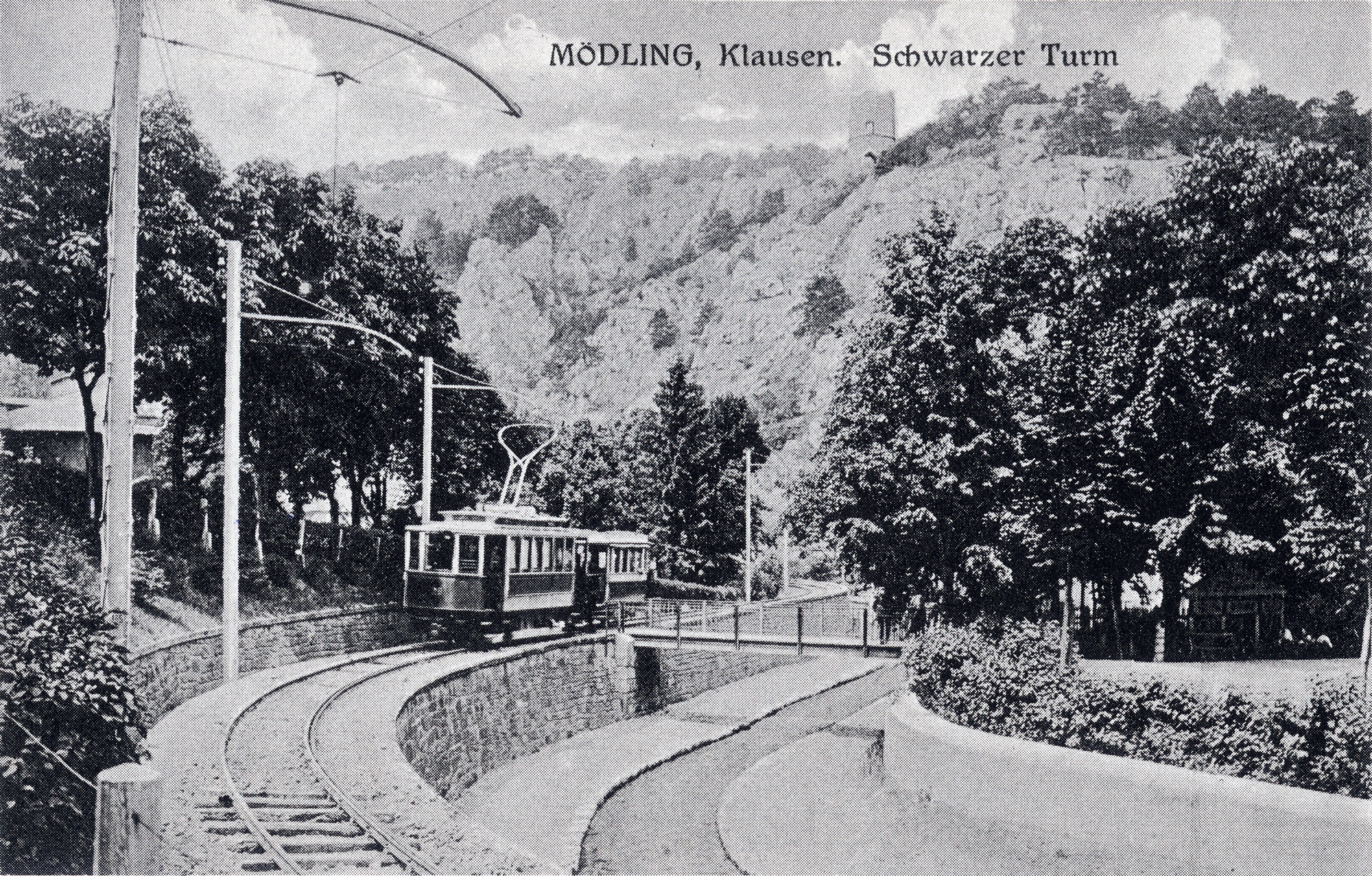 Tiebwagen 25, auf dem Weg von der Klausen zum Bahnhof Mödling